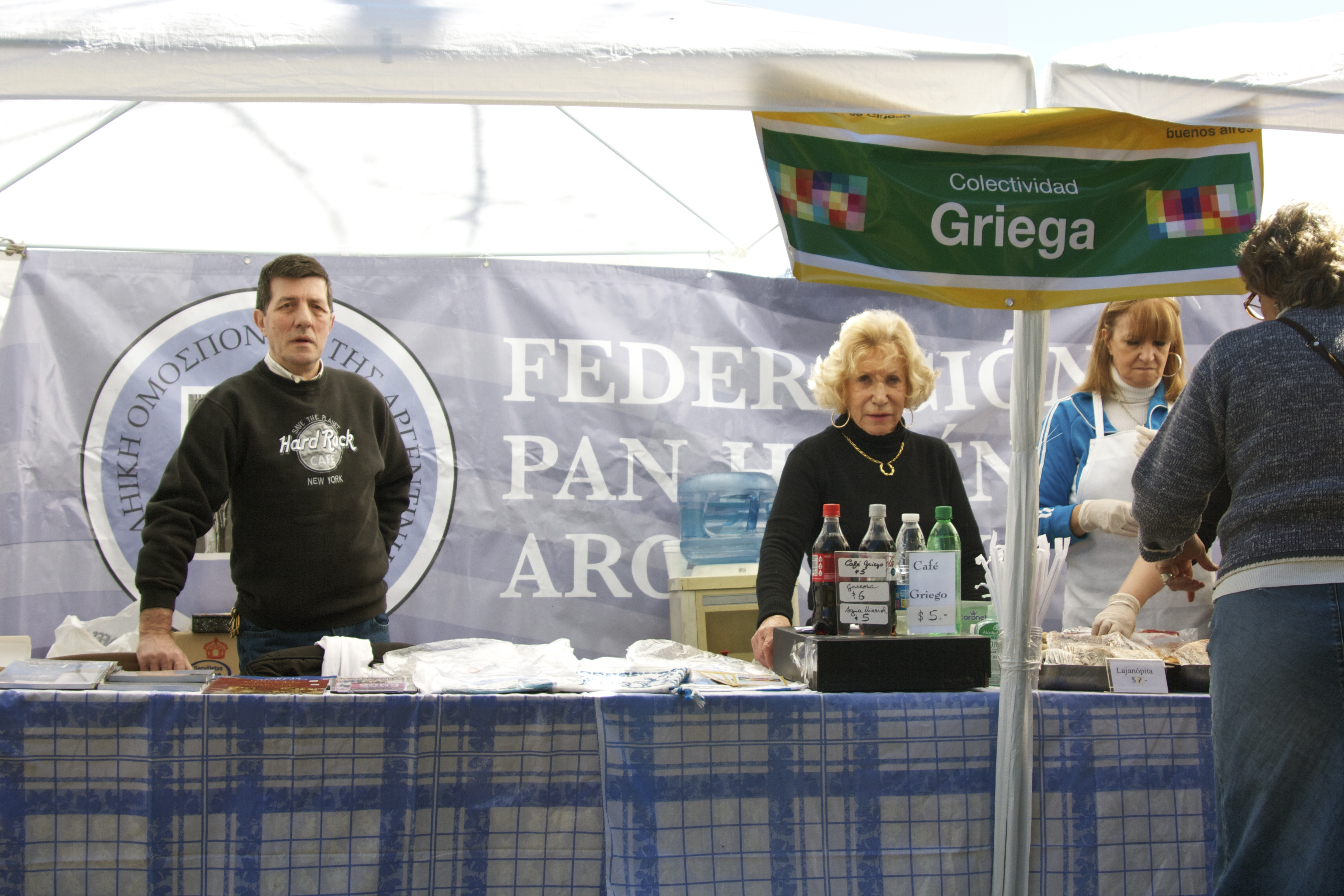 Dia del Inmigrante 2010 26